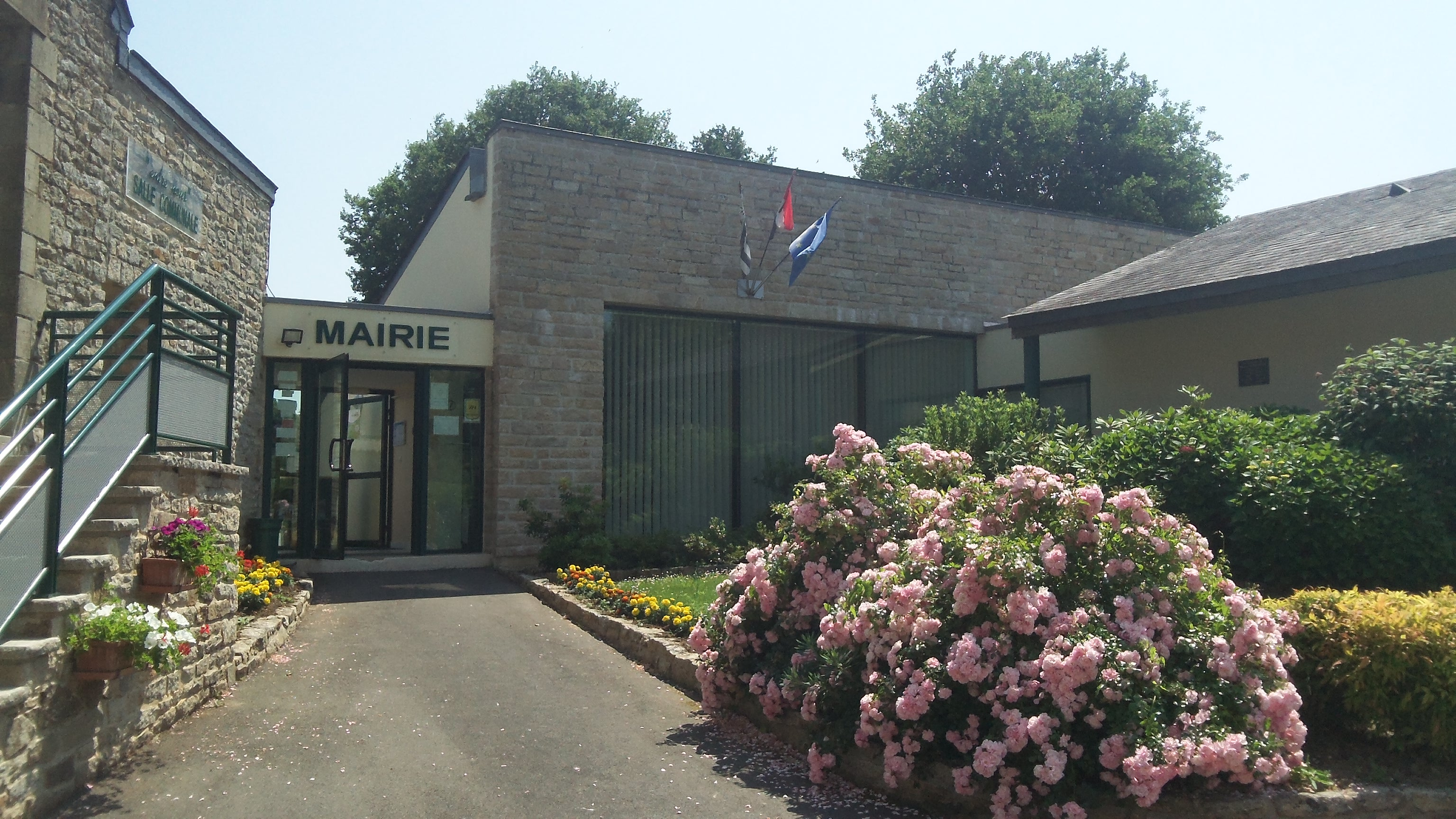 Mairie de la commune de Montertelot, dans le Canton de Ploërmel.